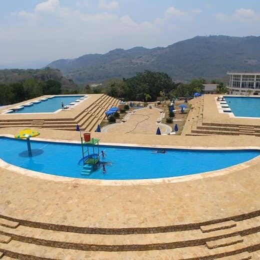 Albercas de forma piramidal, San Fernando, Chiapas